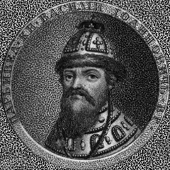 Царь и Вел. кн. Василий Иоаннович.